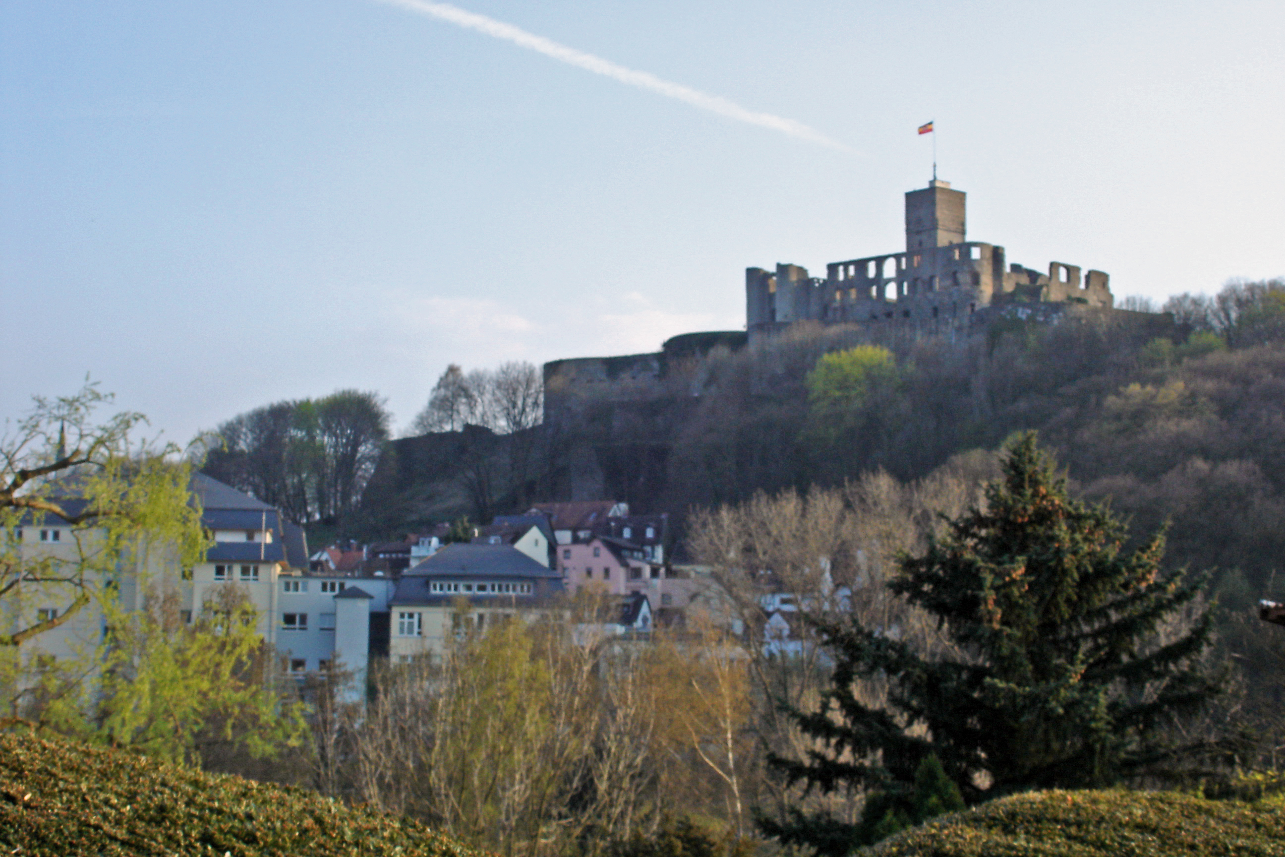 Burgruine Koenigstein